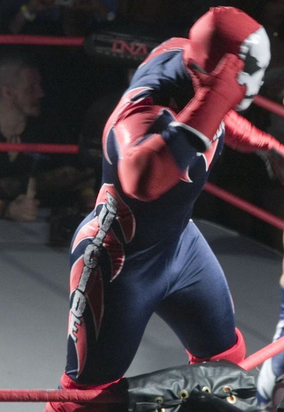 Suicide de la TNA.